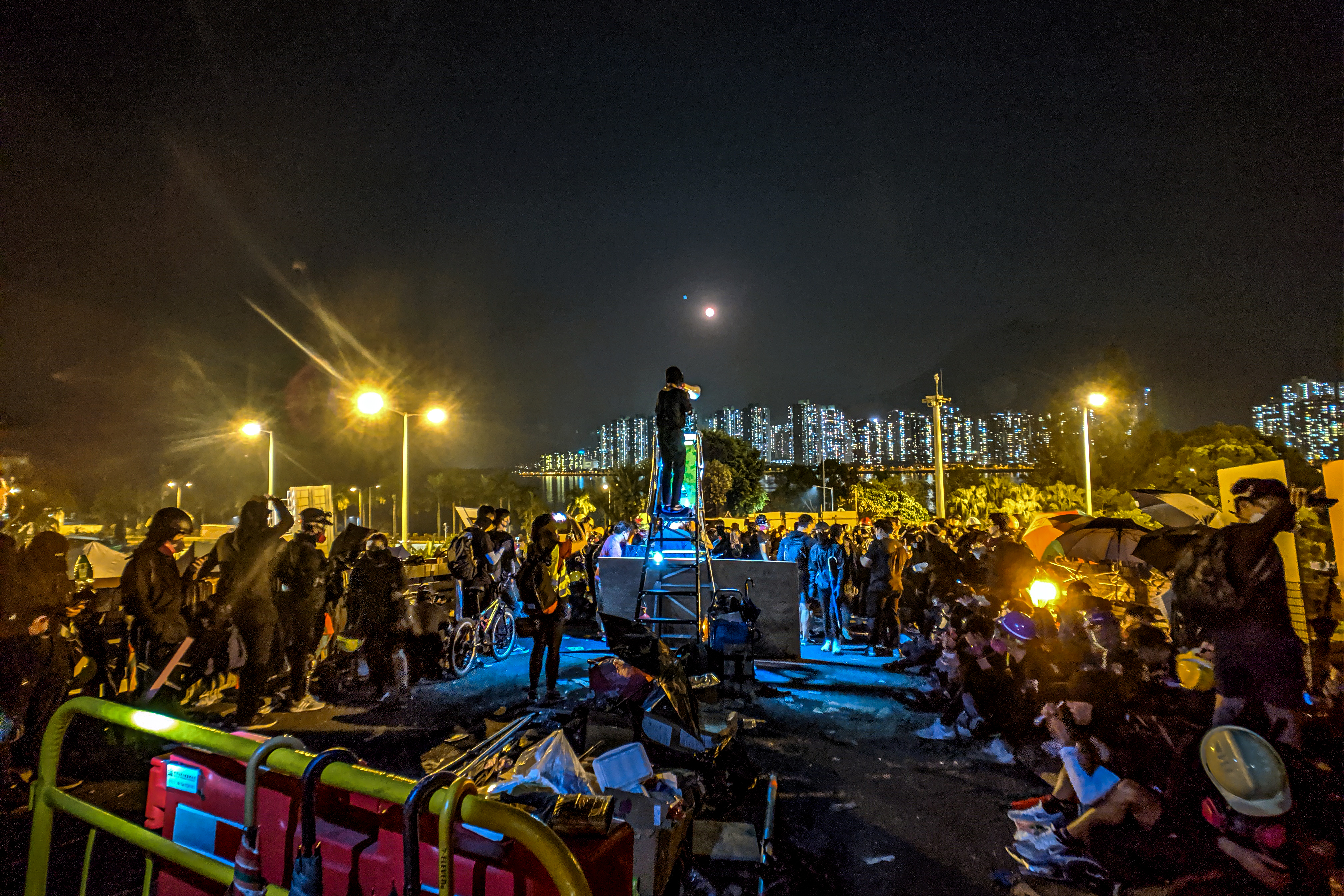 IMG_20191113_192427